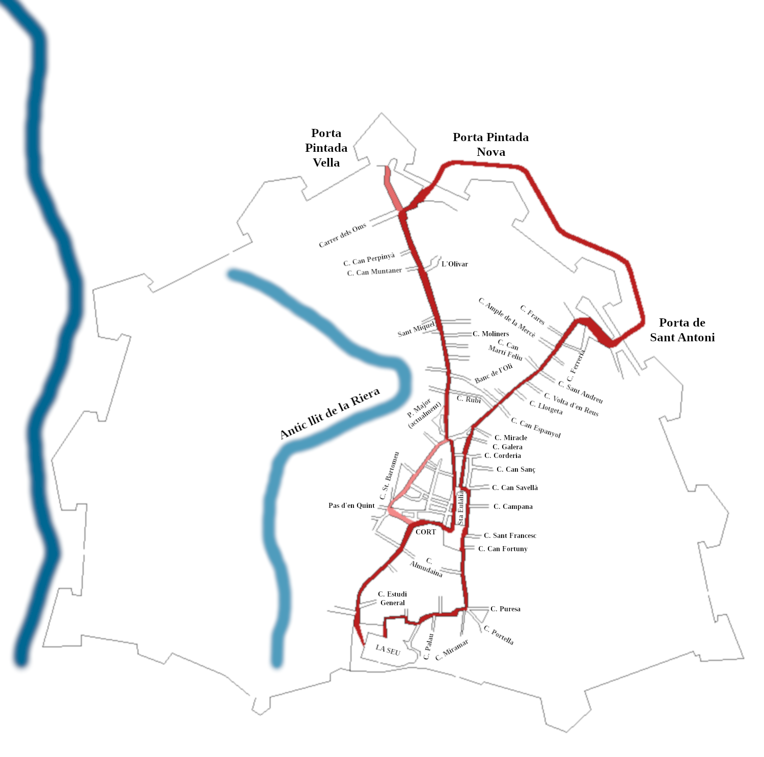 Aquest és el recorregut que feia la processó de l'Estendard d'ençà que es varen bastir les noves murades (sobretot, el bastió de Santa Margalida i la Porta Pintada Nova) fins al darrer any que se celebrà la processó, el 1828. Sortia de la Seu pel portal de l'Almoina, anava cap al carrer d'en Morei, per Santa Eulària i pel carrer del Sindicat, sortia per la Porta de Sant Antoni i entrava per la Porta Pintada. Amb la construcció de les noves murades es va preservar l'antiga Porta Pintada (la mateixa per on entrà el Rei en Jaume quan conquerí la ciutat), pel simbolisme que tenia, però va esdevenir inútil més que per accedir al bastió. Per això, per passar per davall la porta calia que la processó anàs i tornàs. A més, les noves portes no tenien torres, i tot el procés d'alçar i davallar l'Estendard va perdre el trellat, i així es deixà de portar l'Estendard, que a partir de llavors romania a Cort. Atesos aquests fets, la processó deixà de passar per davall la Porta Pintada vella, i així perdé simbolisme. La processó continuava, i davallava pel carrer de Sant Miquel, on es deia una missa a l'església. Continuava la processó pel carrer de l'Argenteria, per bé que de vegades anava pel carrer dels Bastaixos, i, a Cort, anava pel carrer de Palau Reial fins a dins la Seu. Informació extreta d'Alomar, Antoni I., L'Estendard, la festa nacional més antiga d'Europa, Palma: Documenta Balear, 1998.